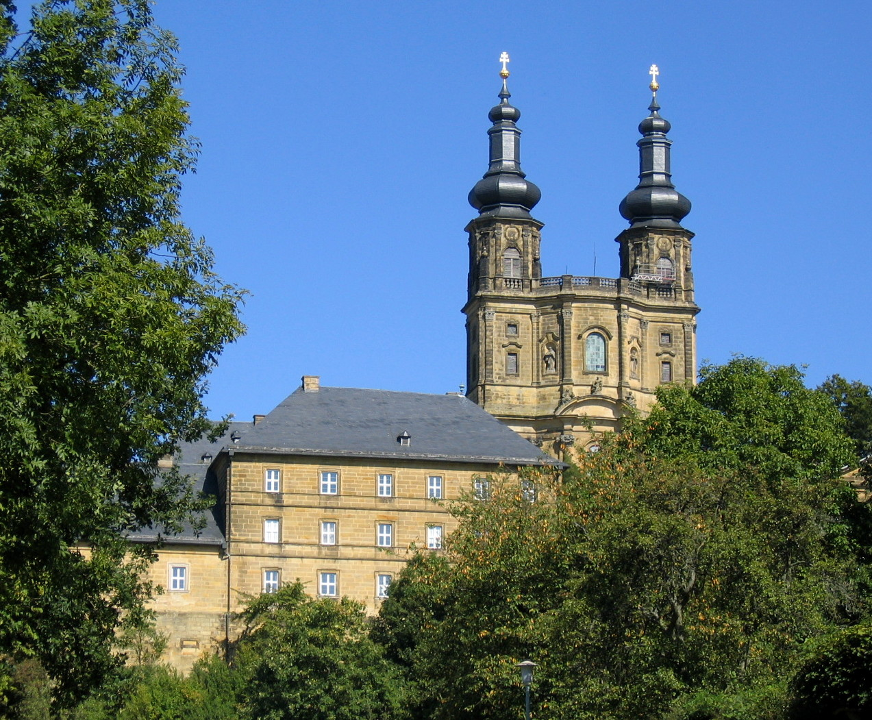 Doppelturm der Klosterkirche Banz in der Nähe der Ortschaften Bad Staffelstein und Lichtenfels.